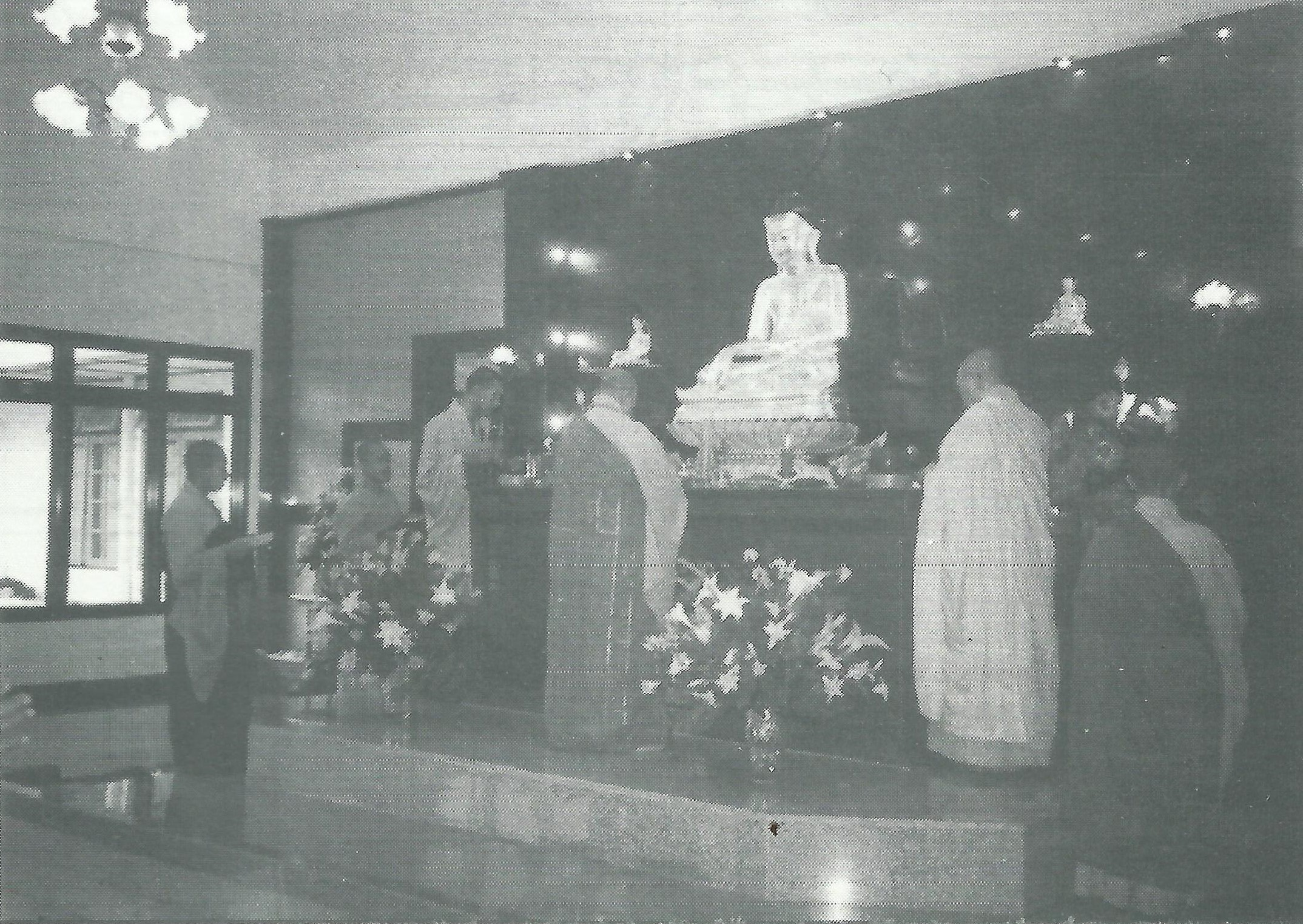 Upacara pembersihan ruangan pada tanggal 28 Oktober 1997.